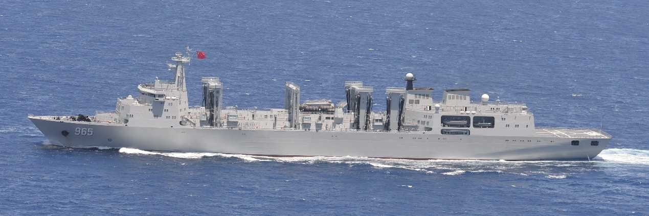 ８月１日（木）午前９時頃、海上自衛隊第５航空群所属「Ｐ－３Ｃ」（那覇）、第１３護衛隊所属「さわぎり」（佐世保）及び佐世保警備隊所属「あまくさ」（佐世保）が、久米島の南約１２０ｋｍの海域を北上する中国海軍ルーヤンⅢ級ミサイル駆逐艦２隻、ジャンカイⅡ級フリゲート３隻及びフユ級高速戦闘支援艦１ 隻の計６隻を確認した。 その後、これらの艦艇が沖縄本島と宮古島の間の海域を北上し、東シナ海へ向けて航行したことを確認した。 なお、６隻の艦艇のうち、ルーヤンⅢ級ミサイル駆逐艦１隻、ジャンカイⅡ級フリゲート２隻及びフユ級高速戦闘支援艦１隻の計４隻は 7 月２５日（木）に、ルーヤンⅢ級ミサイル駆逐艦１隻及びジャンカイⅡ級フリゲート１隻の計２隻は７月２７日（土）に、沖縄本島と宮古島の間の海域を南下した艦艇と同一である。